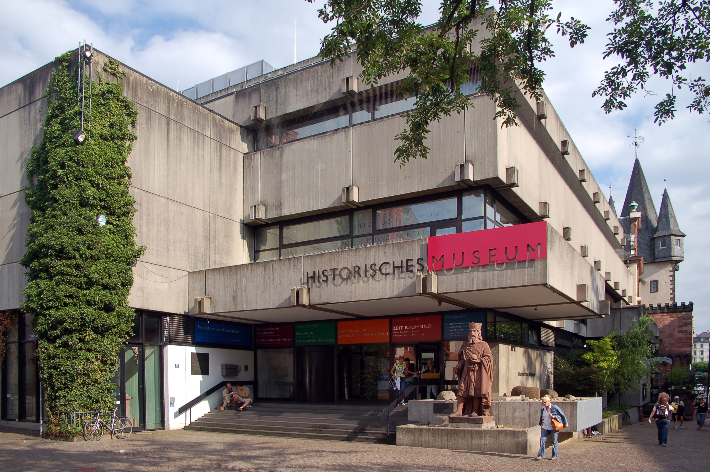 Eingang des Historischen Museums Frankfurt am Main